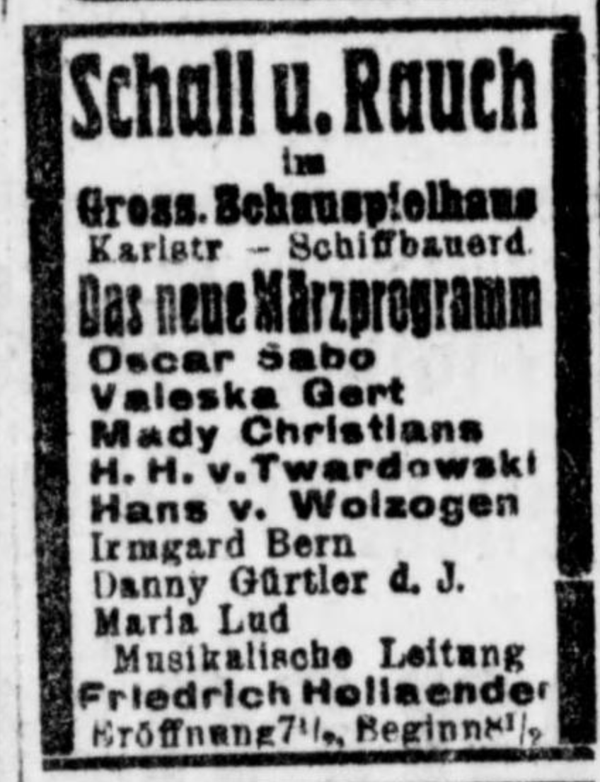 Anzeige von Schall und Rauch im Grossen Schauspielhaus, Oscar Sabo, Valeska Gert, Mady Christians, H.H. Twardowski, Hans v. Wolzogen, Irmgard Bern, Danny Gürtler d. J., Maria Lud, Musikalische Leitung: Friedrich Hollaender